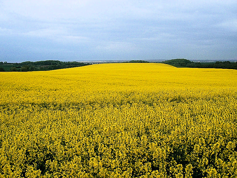 Blick von Hohenfelde in Richtung Warnemünde